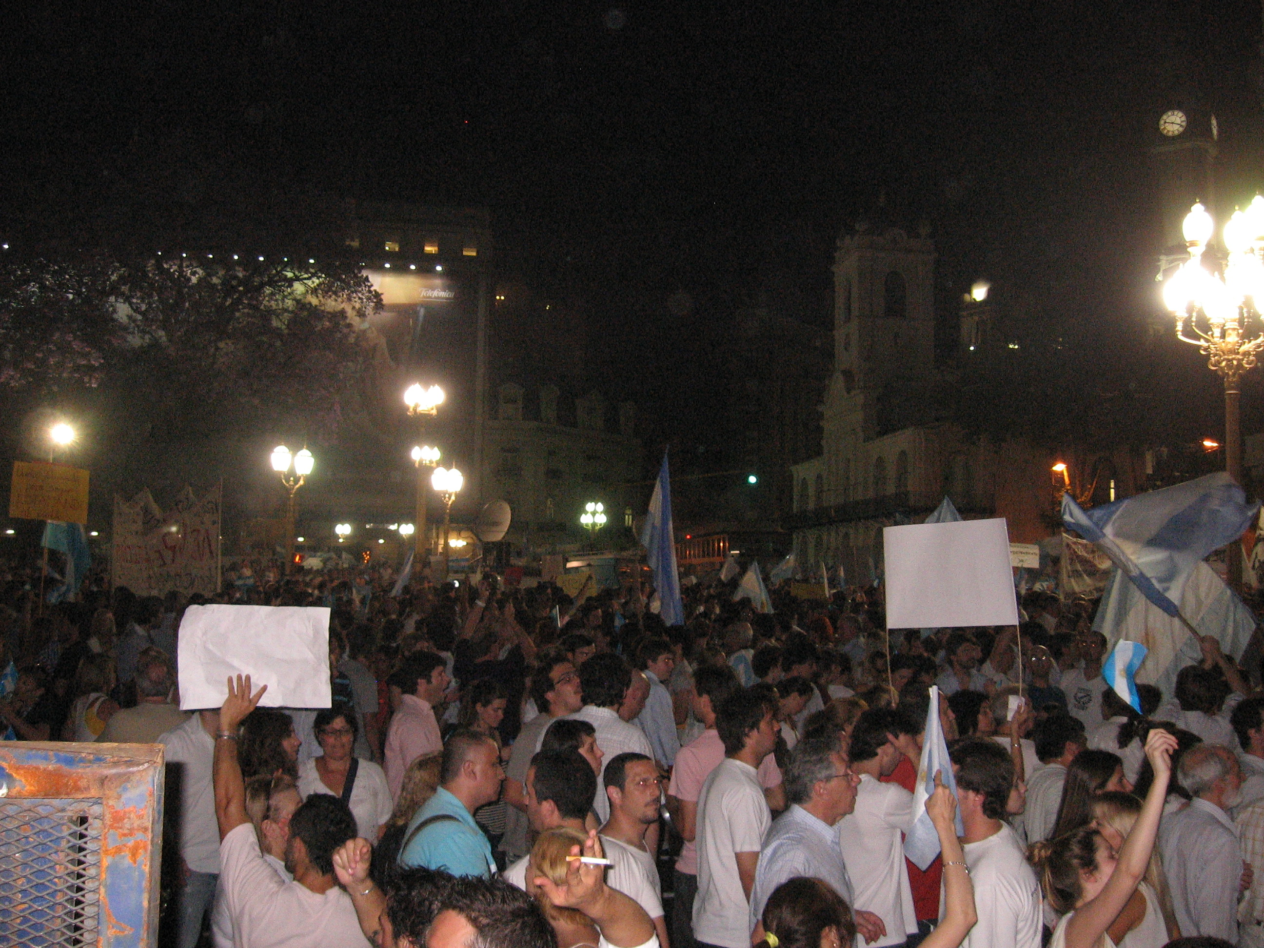 Todo el país reunido enfrente del cabildo, protestando contra los abusos del gobierno. Como en 1810...